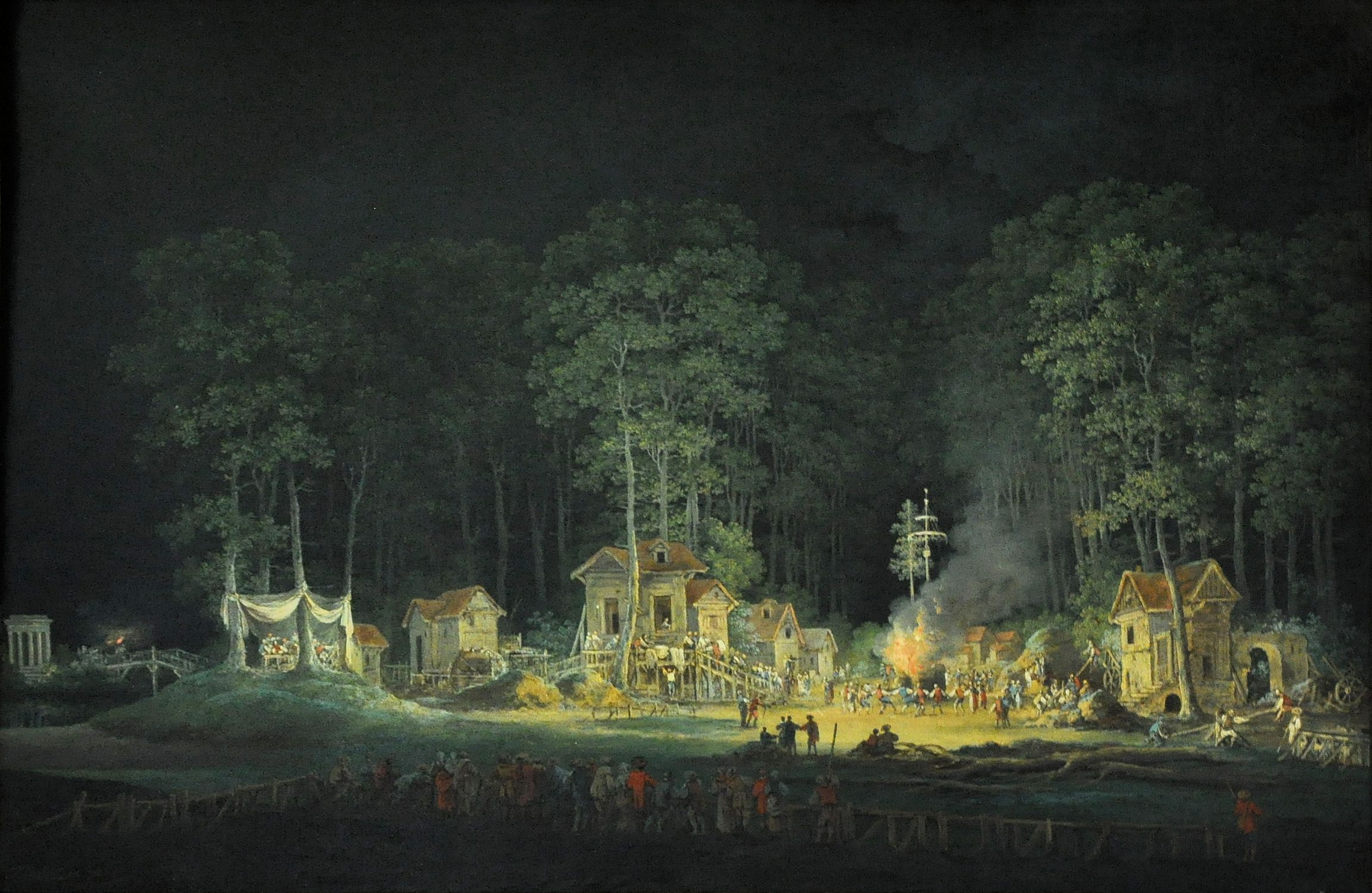 Représentation d'une fête de nuit dans les jardins du Petit Trianon - 1785 - Claude-Louis Châtelet